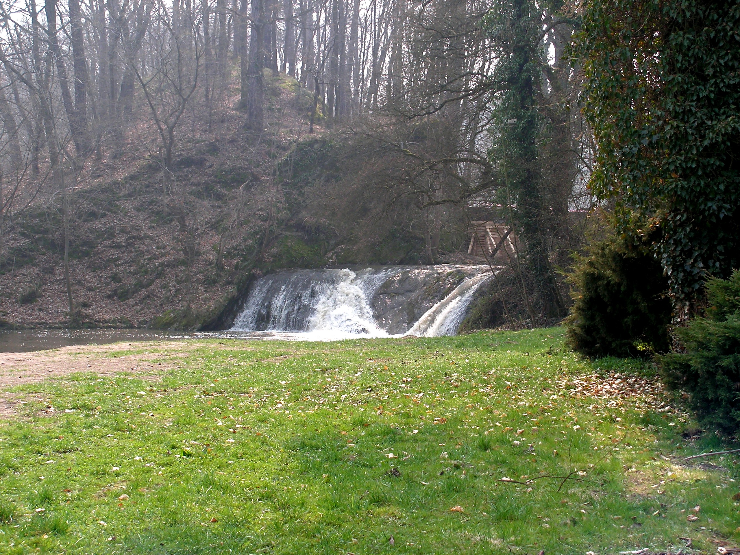 Malý vodopád na říčce Hostačovce ve Žlebech.